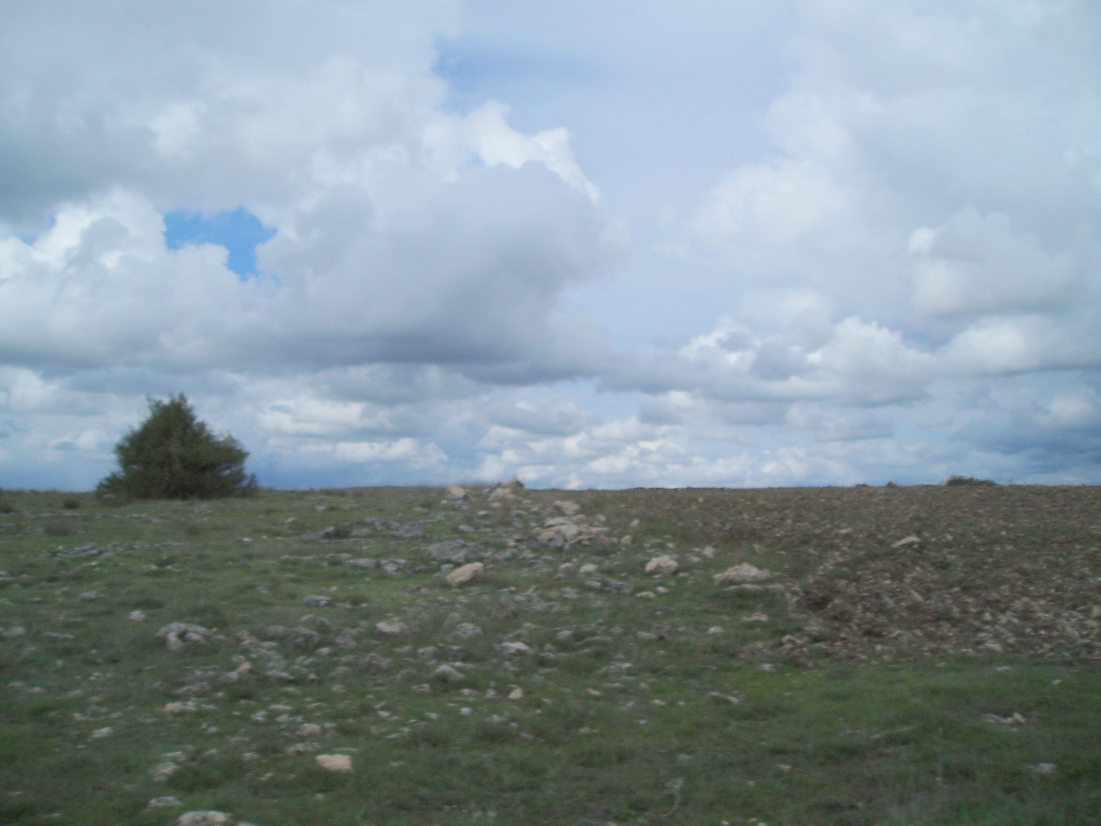 Paisaje de la paramera en el Parque Natural de las Hoces del Río Duratón.